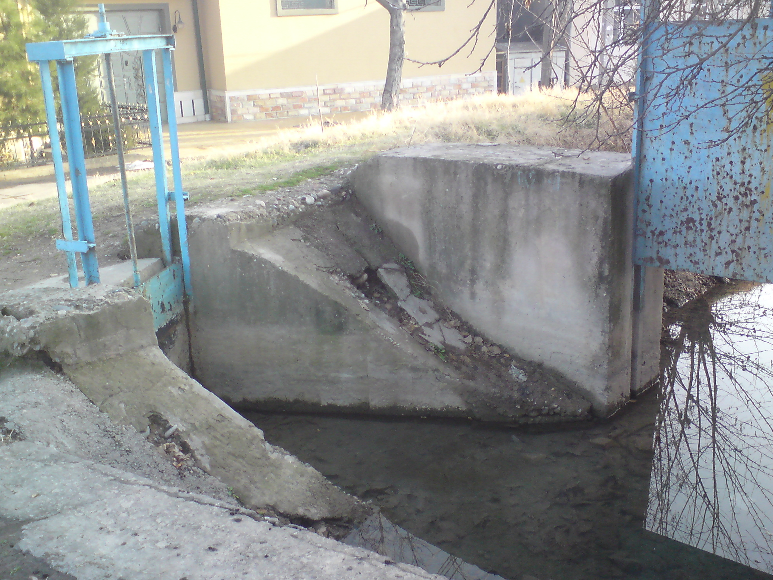 От канала Аккурган (течёт прямо) отходит влево канал Дархан. Город Ташкент